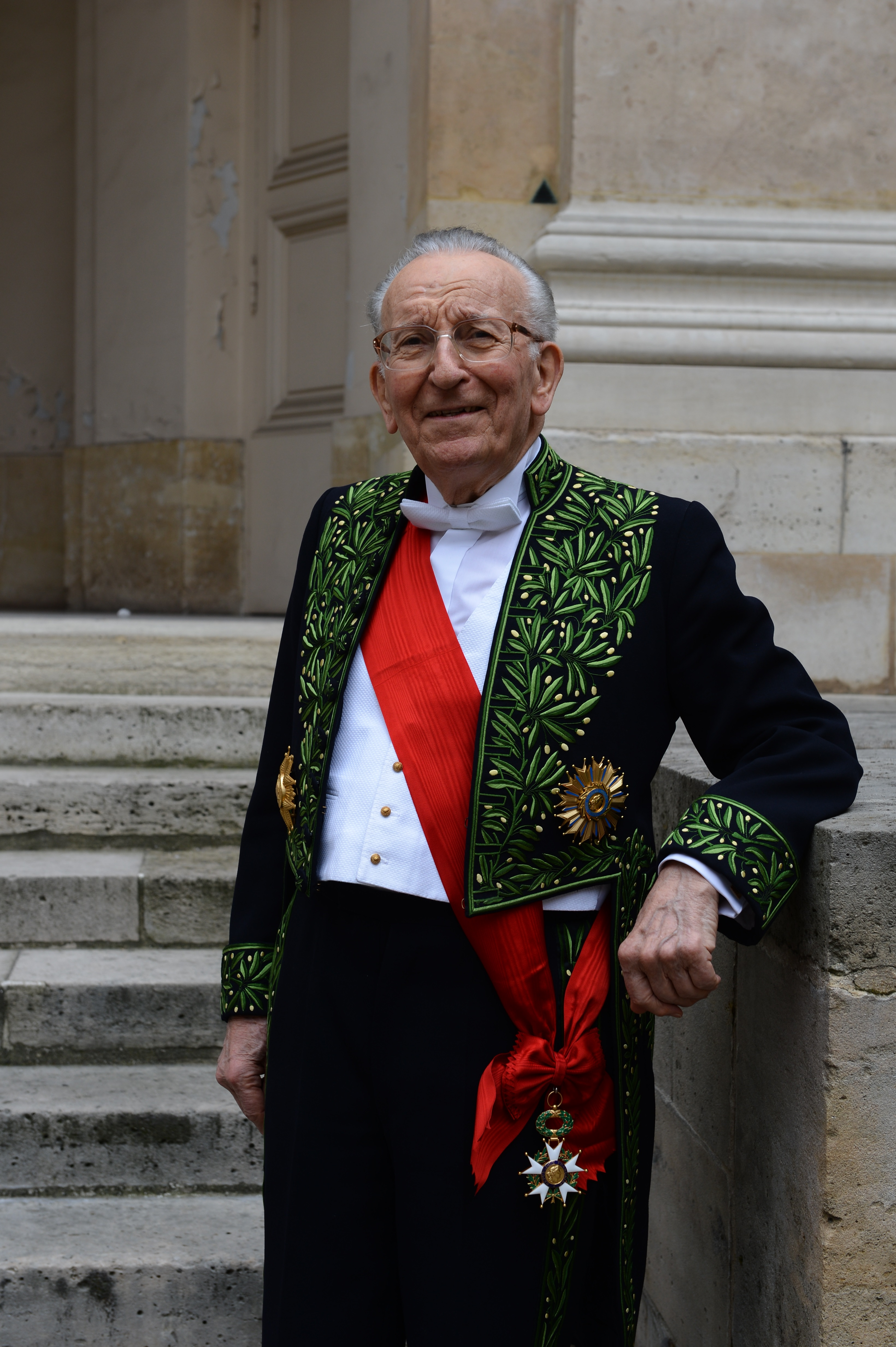 Photo d'Yvon Gattaz en grand habit vert d'académicien